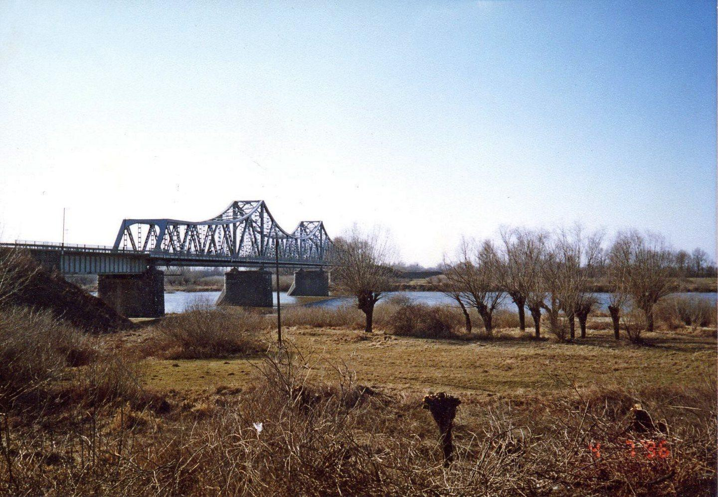 Most drogowy na Wiśle w Szczucinie koło Tarnowa (Olympus mju-1)